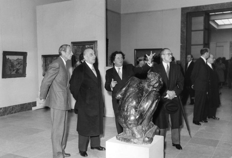 München, Haus der Kunst anlassl. des Besuches des griechischen Ministerpräsidenten Papagos von 30.6-6.7.1954